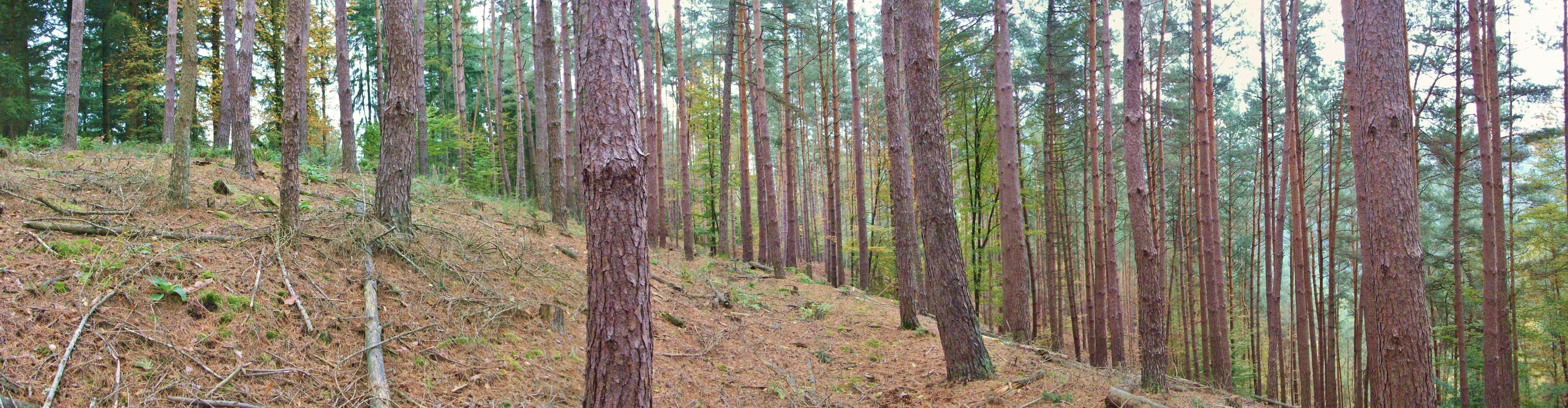 Burg Stutz: Ringwallanlage oder unvollendete hochmittelalterliche Burganlage? Blick nach Osten, Ringgraben in Bildmitte, Steilabfall Ri. Süden